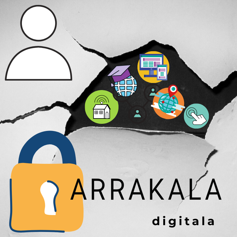 Arrakala edo eten digitala maila sozioekonomiko desberdinak dituzten gizabanakoen, familien, eremu ekonomikoen eta geografikoen arteko desfasea edo banaketa da